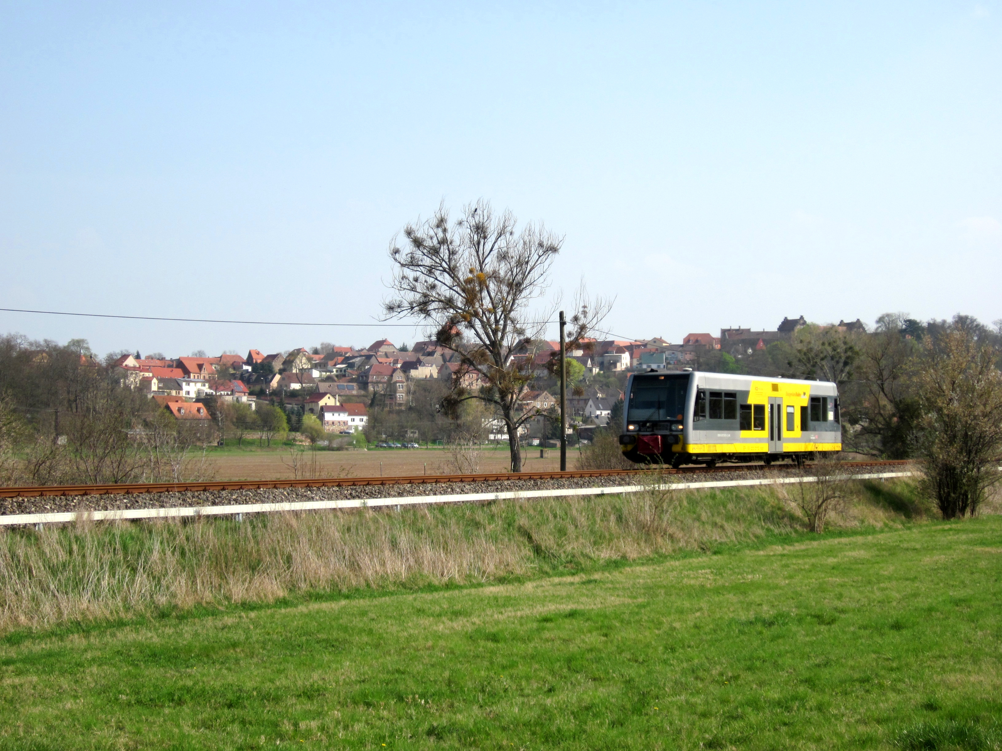 Zug der Burgenlandbahn im Unstruttal bei Zingst (Ortsteil von Vitzenburg, Stadt Querfurt, Saalekreis, Sachsen-Anhalt), im Hintergrund die Stadt Nebra